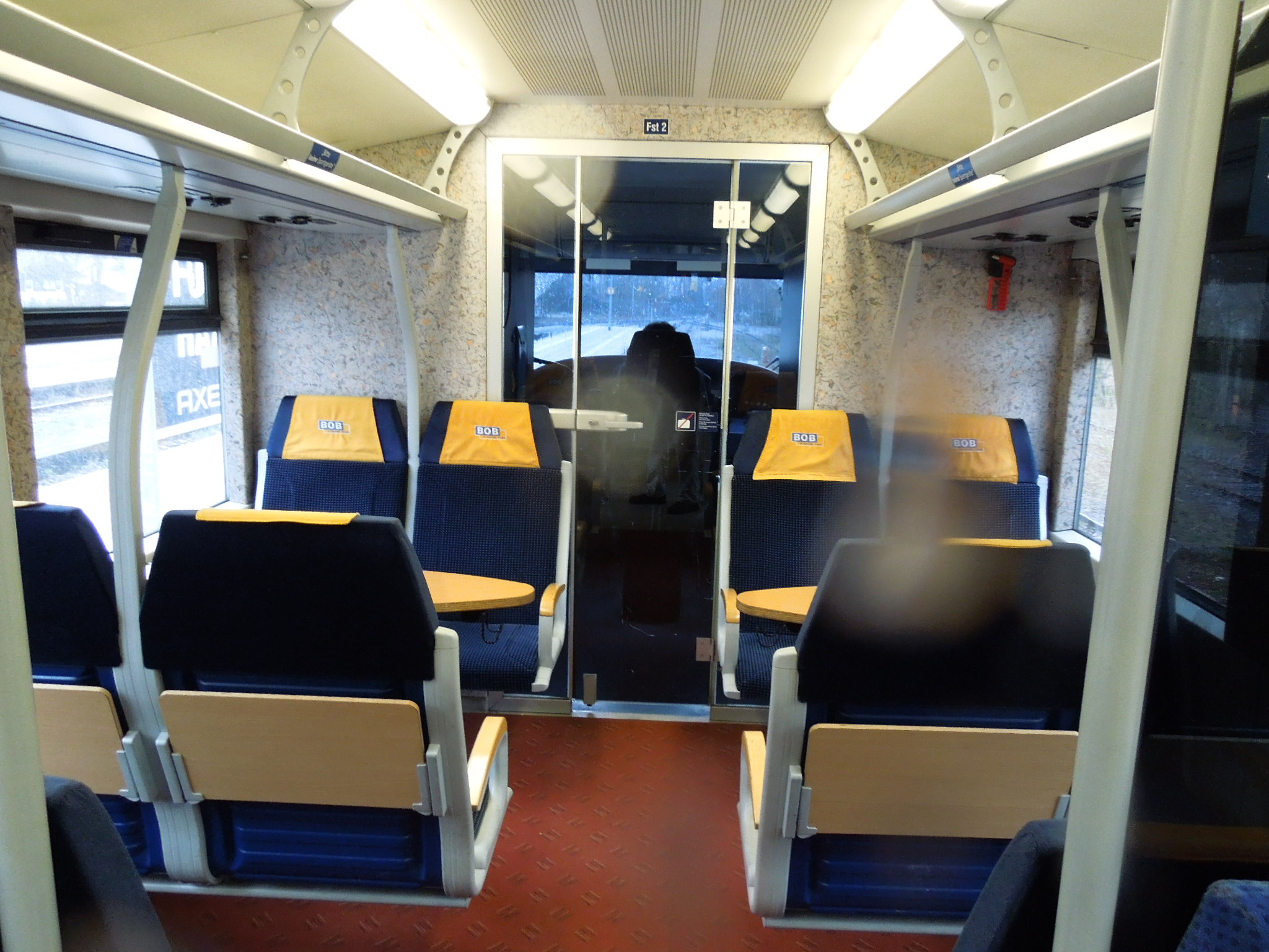 A BOB első osztályú utastere